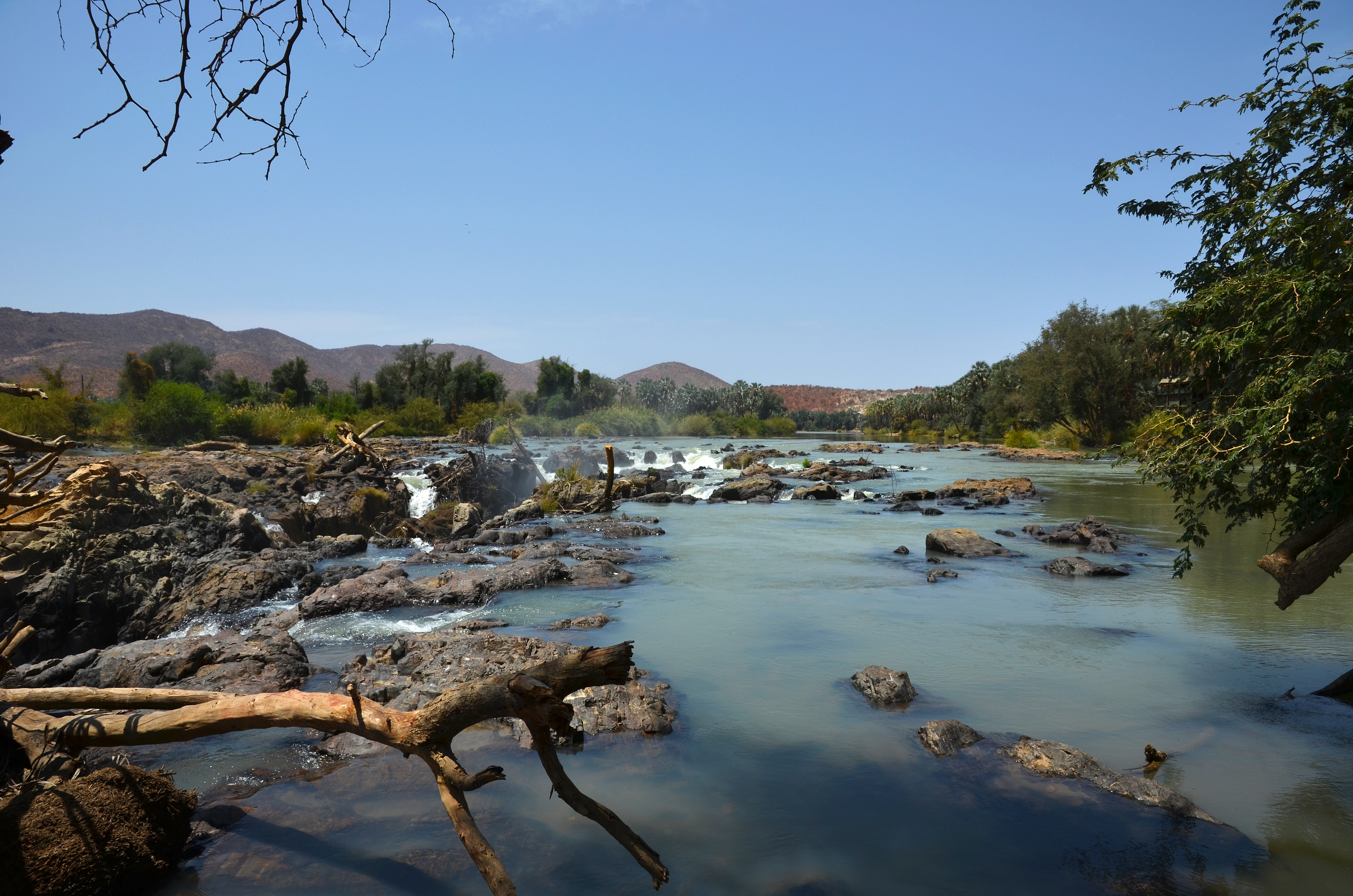 Řeka Kunene River, vodopády Epupa Falls - Namibie, Angola